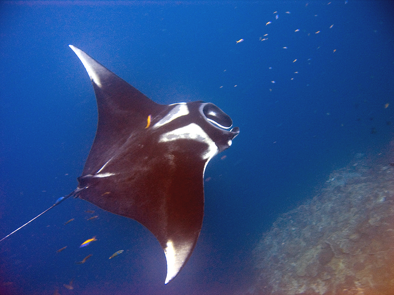 Manta Ray (Manta birostris) at Hin Daeng, Thailand.